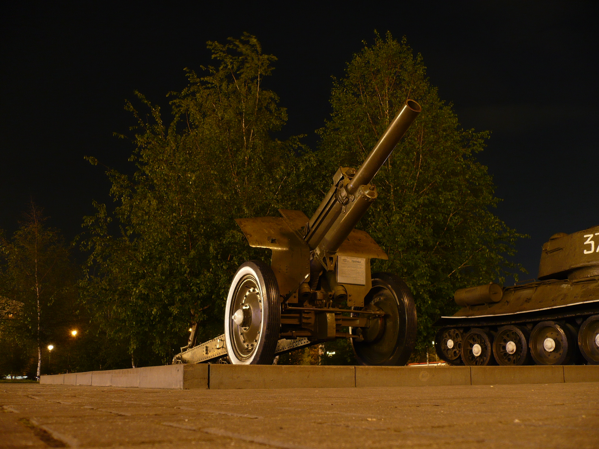 Пушка возле Музея-диорамы «Курская битва. Белгородское направление»